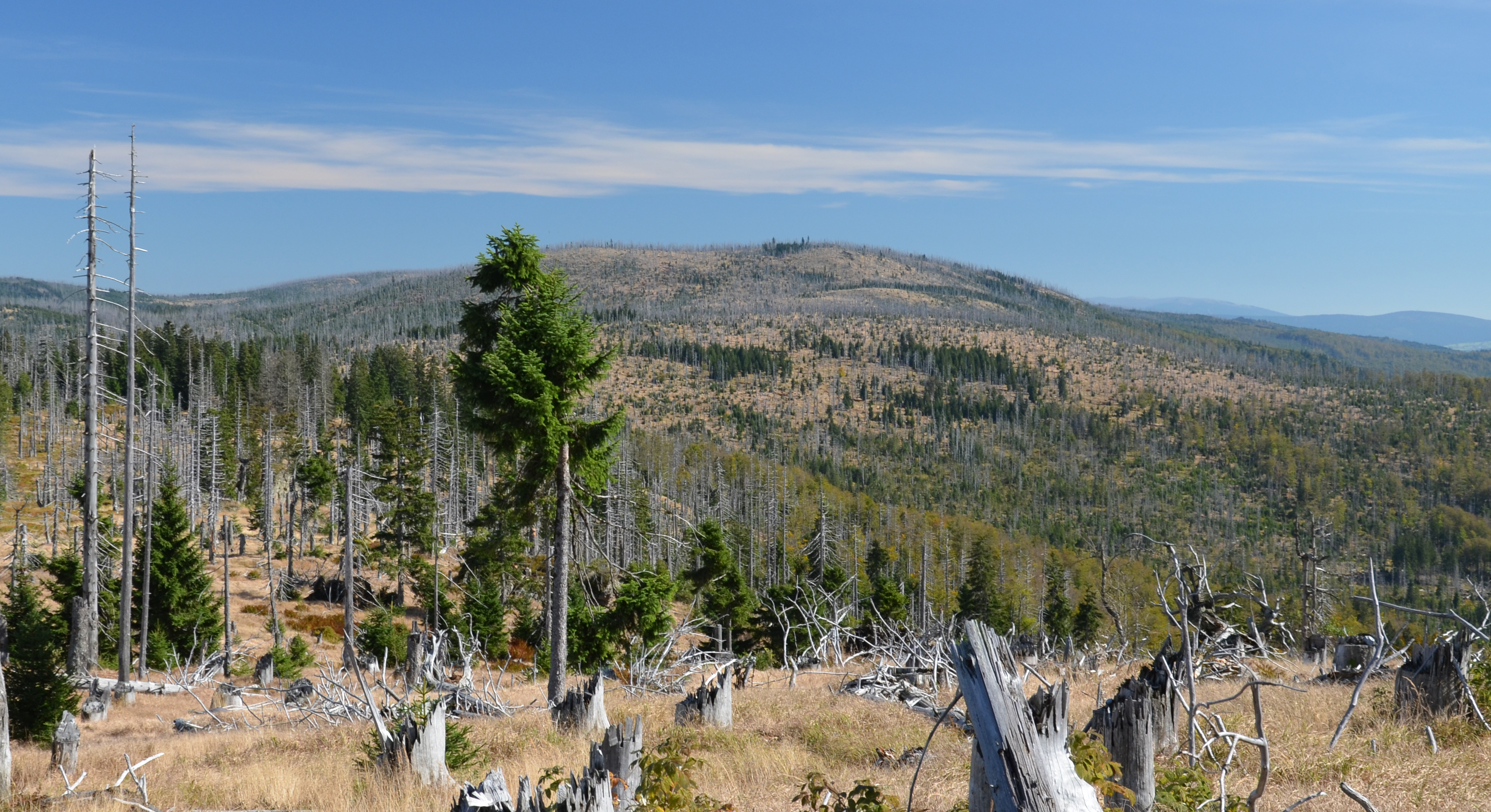 Blatný vrch (něm. Plattenhausenriegel, 1376 m) na Šumavě/v Bavorském lese, pohled z Roklanu